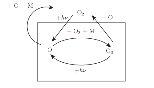 Cycle de Chaman de l'ozone